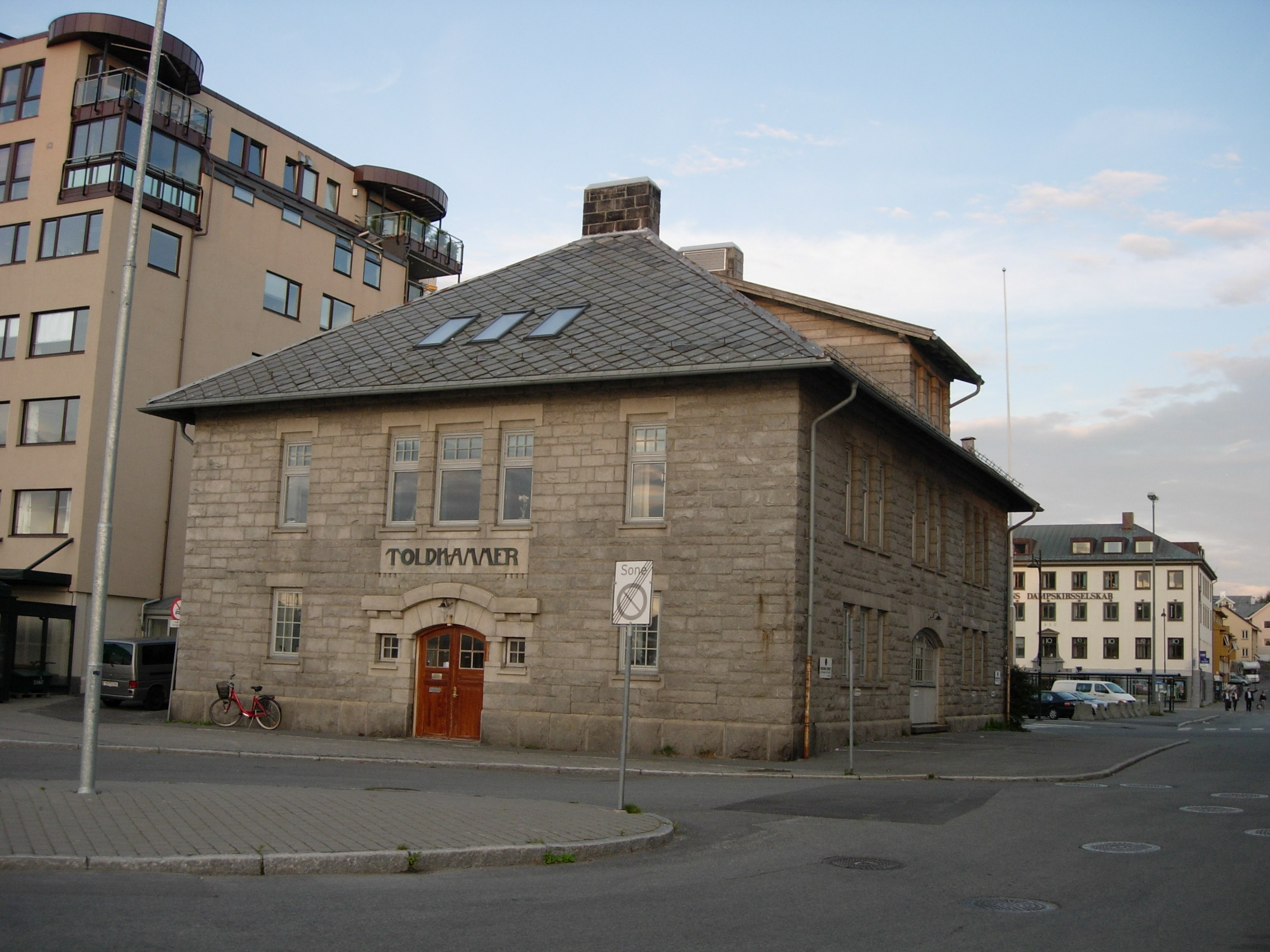 Bodø Toldkammer.